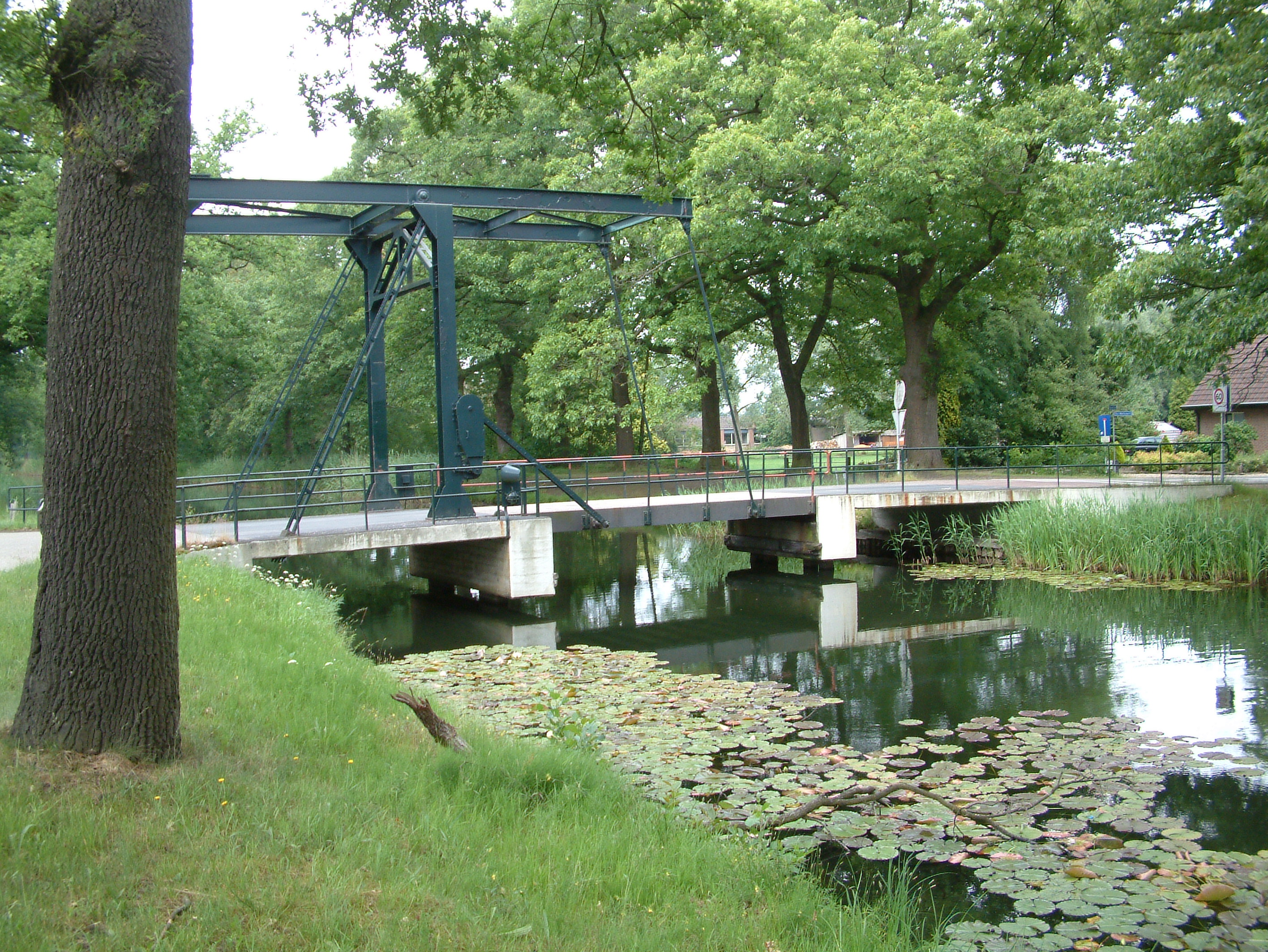 Apeldoorns kanaal van Dieren naar Hattem